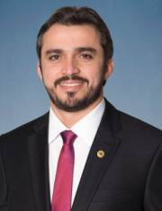 Foto do atual Deputado Estadual Nelinho